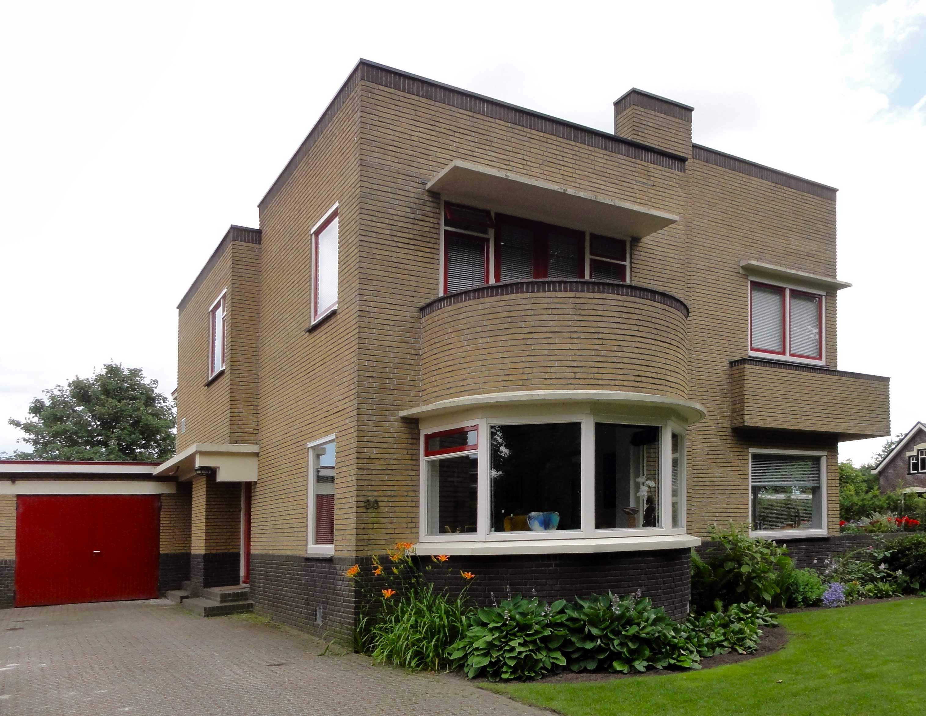 Woonhuis Zuiderstraat 36 Noordbroek